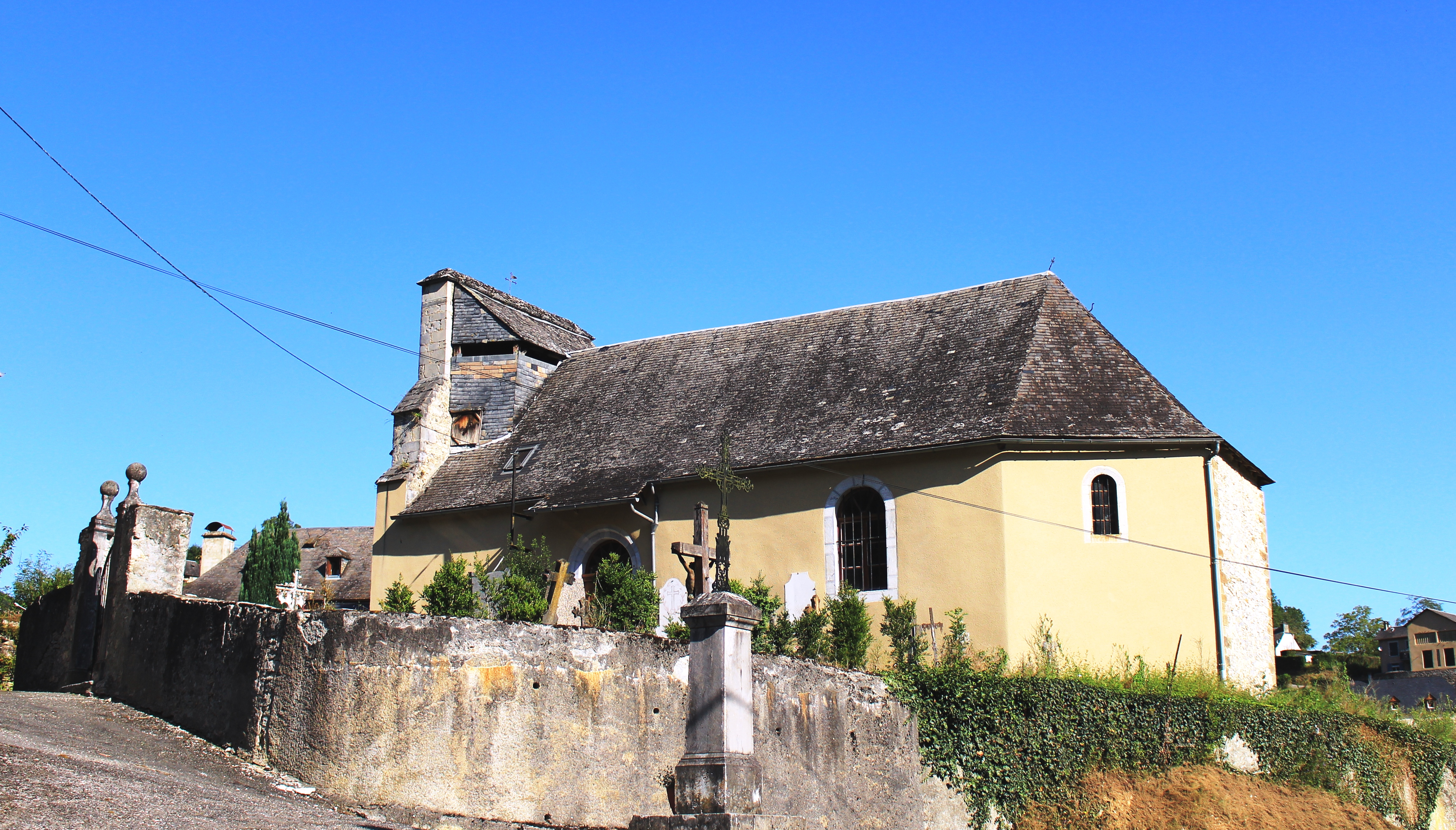 Église de la Nativité-de-la-Sainte-Vierge de Banios (Hautes-Pyrénées)